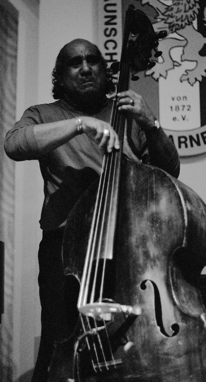 Walter Booker mit dem Nat Adderley Quintett, 25.02.1993, Braunschweig